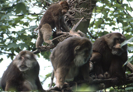 Groupe de macaques du Tibet. Photographie de Bernard Thierry avec son aimable autorisation.